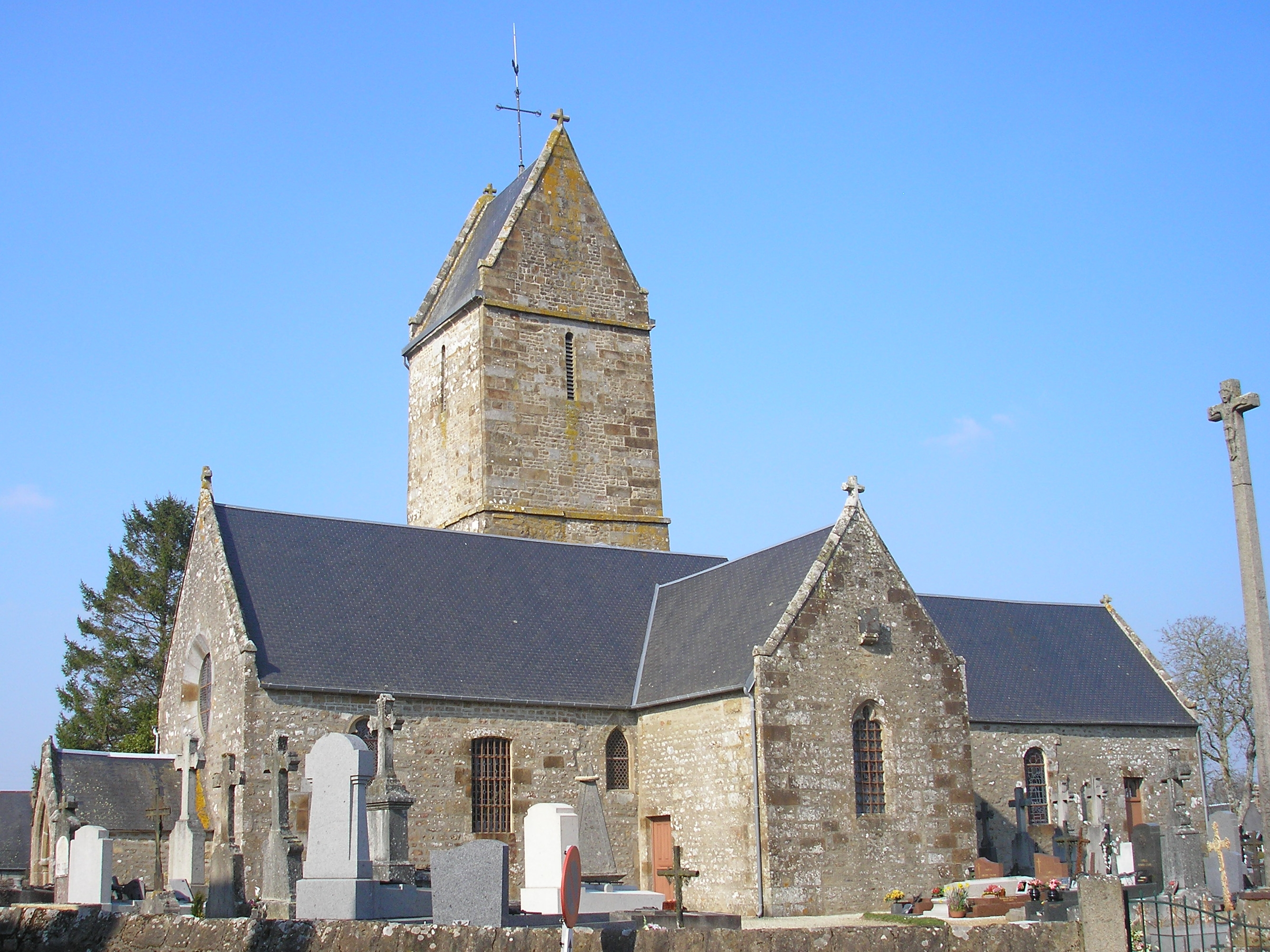 Maisoncelles-la-Jourdan (Normandie, France). L'église Saint-Amand.